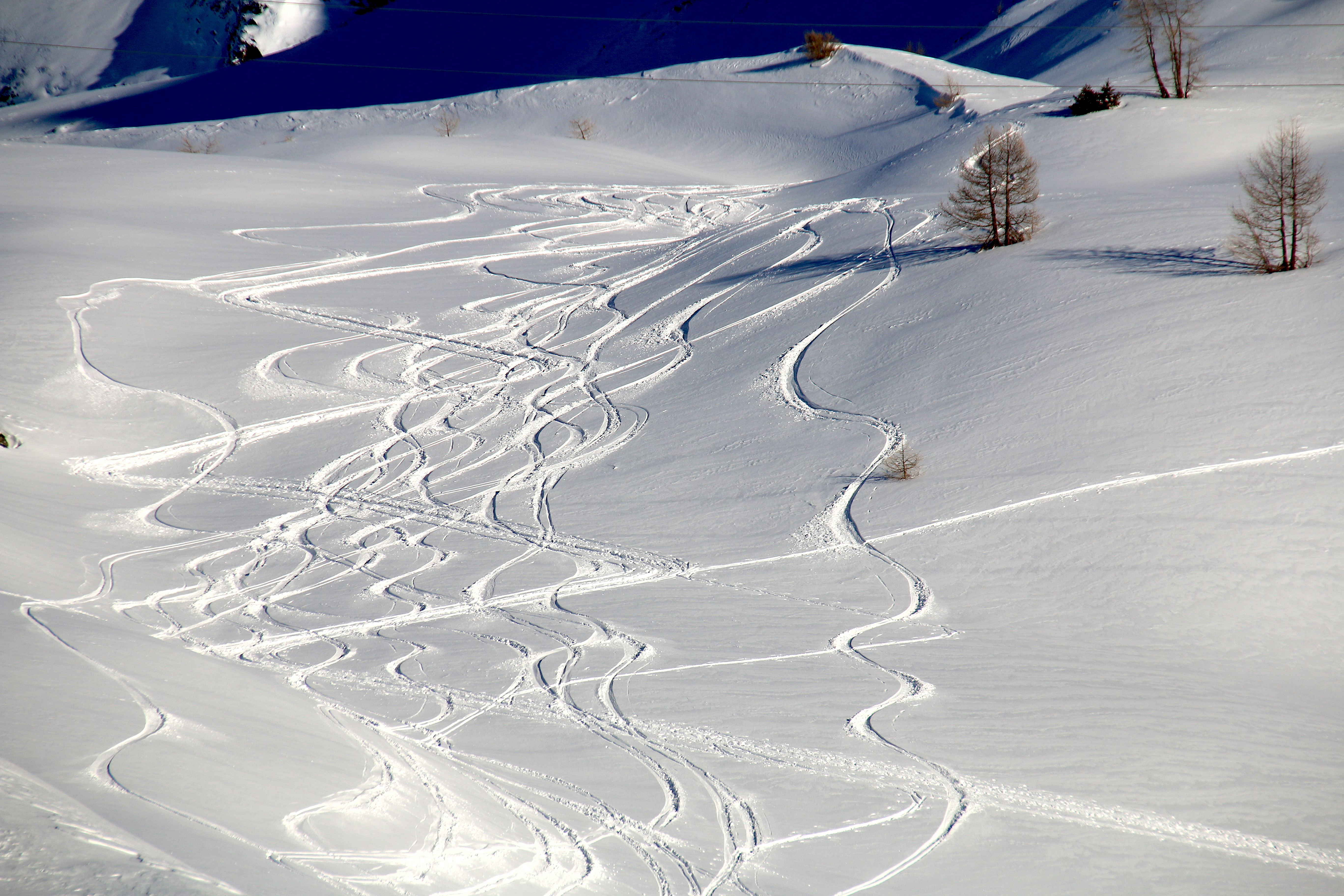 Schneespuren Simplon (2019)